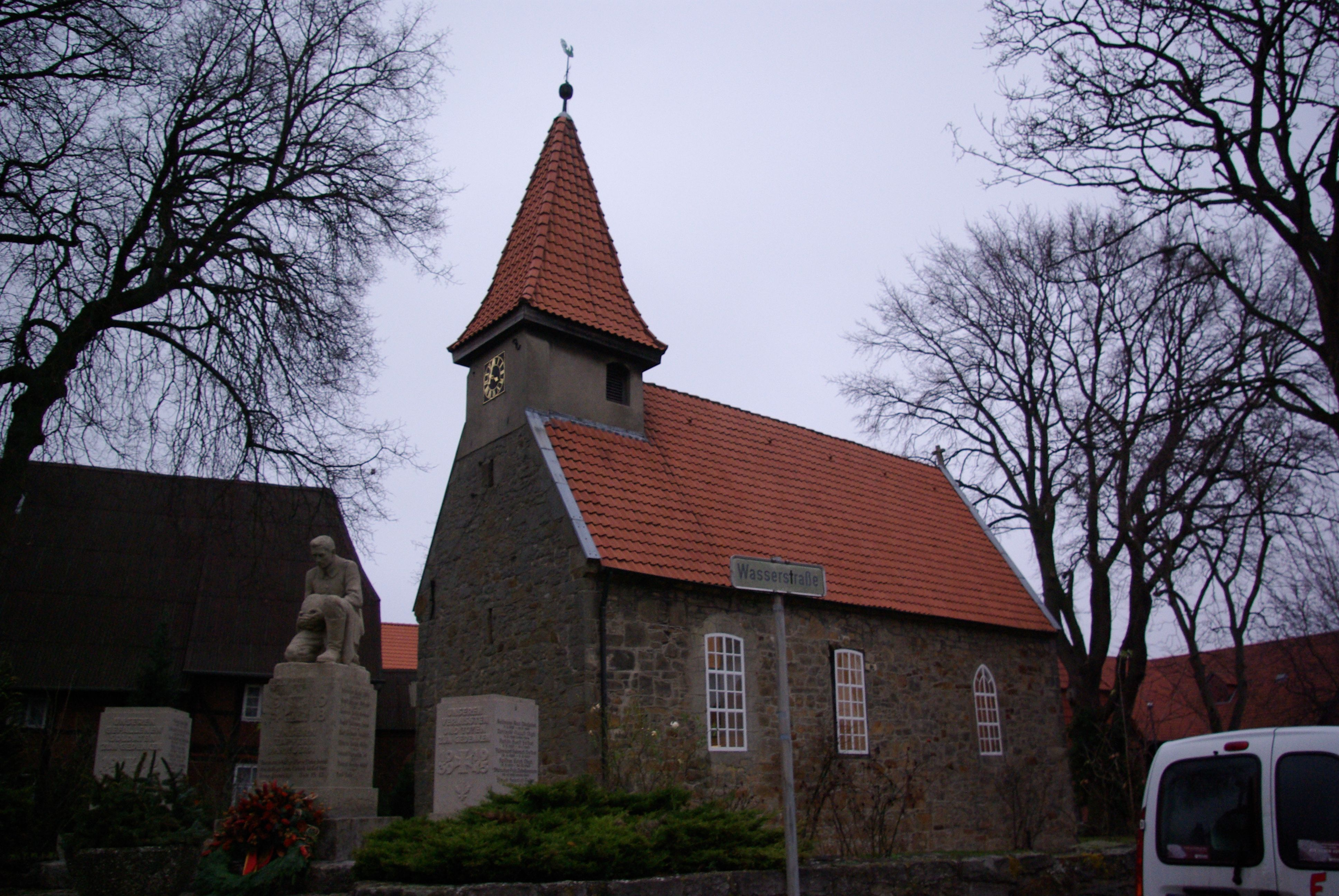 In Schliekum, ein Ortsteil von Sarstedt, in Niedersachsen, befindet sich die Christopherus Kapelle. Zu sehen ist die Kapelle mit dem Kriegerdenkmal. Geotags in Exif-Daten.